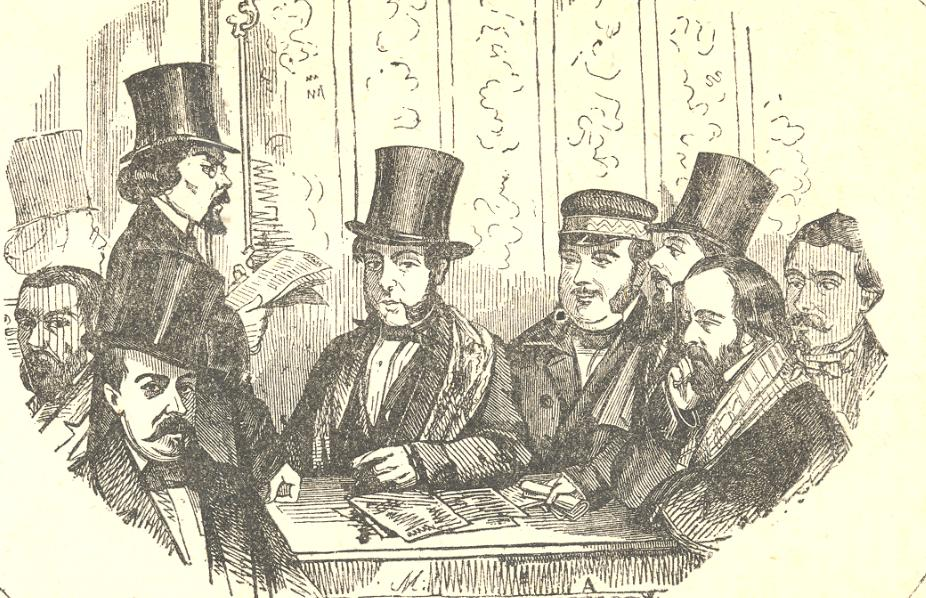 caricatura moliné-crònica